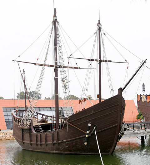 Reproducción de la Carabela "La Pinta" en el Muelle de las Carabelas del Paraje de La Rábida, en Palos de la Frontera.